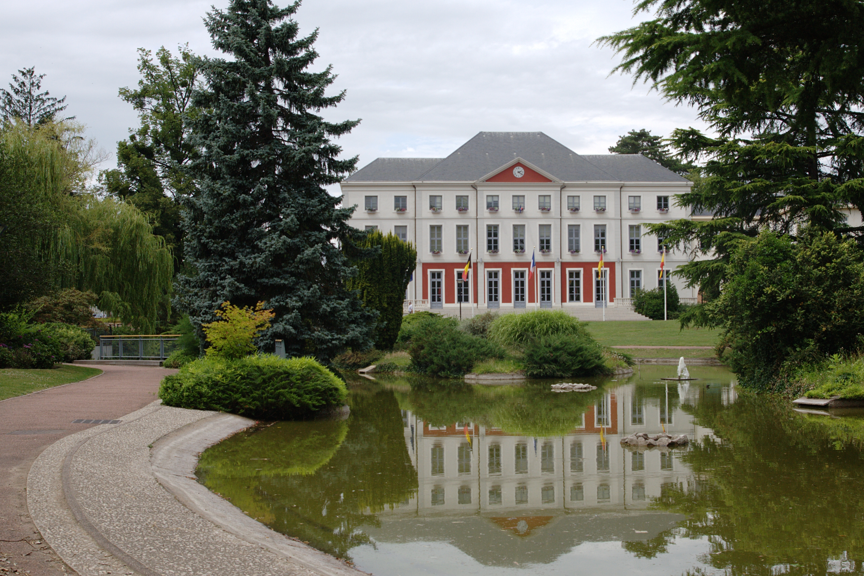 La mairie du Coteau vue de derrière, depuis le parc Bécot